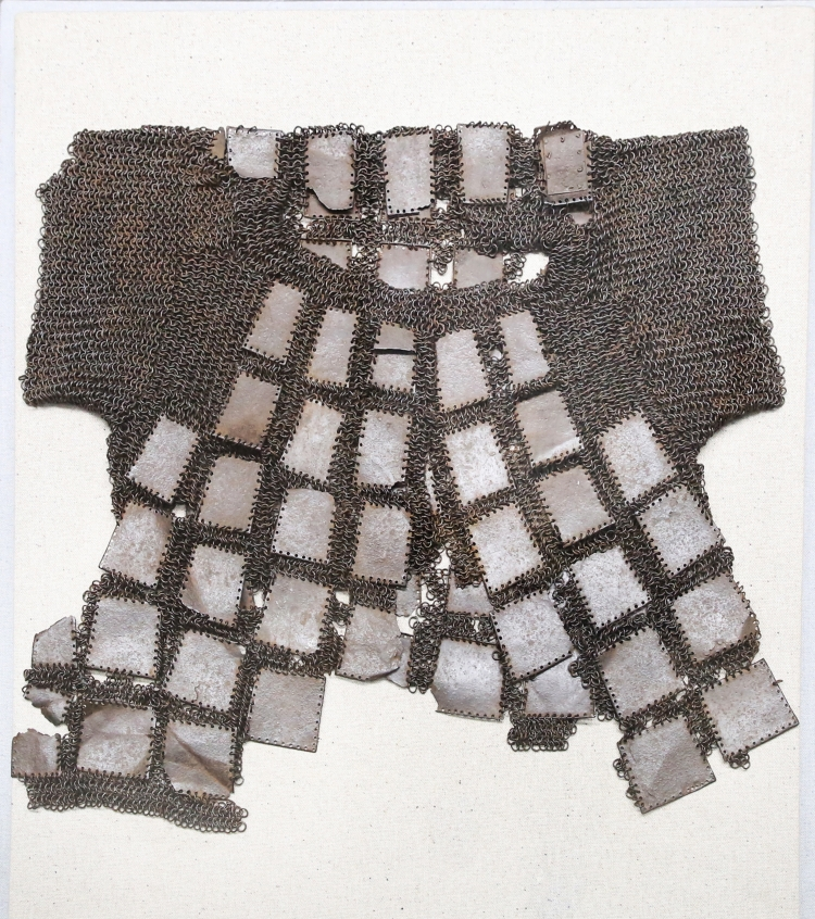 14世紀末倭寇討伐に軍功を上げた鄭地将軍の鎧